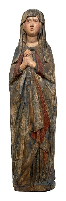 Panna Marie Bolestná (poslední třetina 15. stol.)